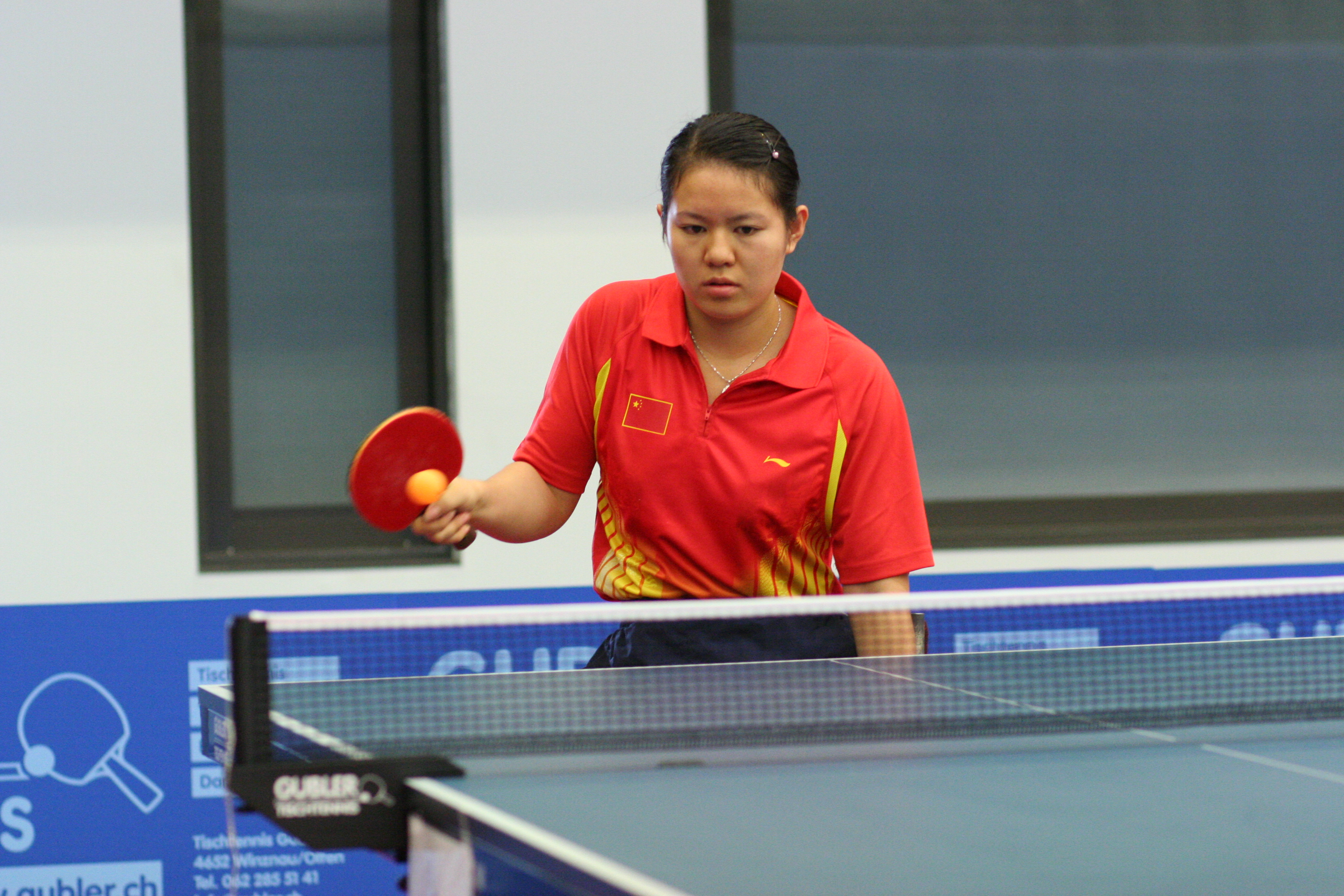 Gui Xiang Ren (China)